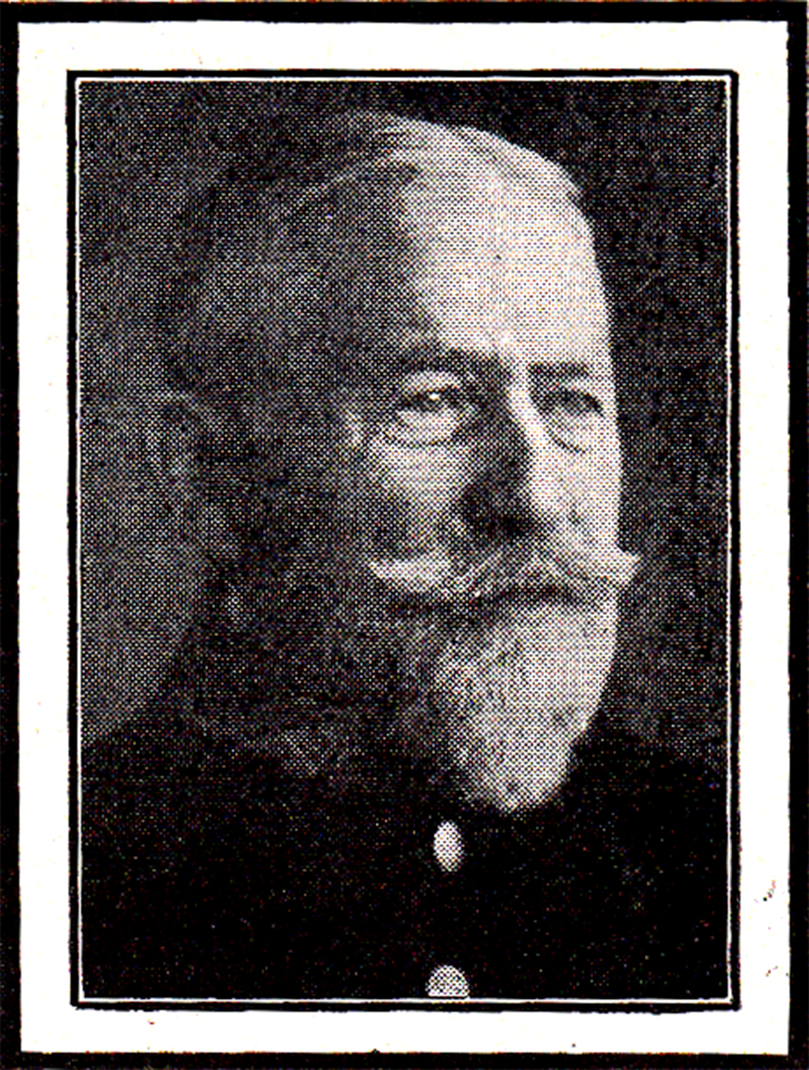 Georgi im Habit eines sächsischen Bergrates um 1920